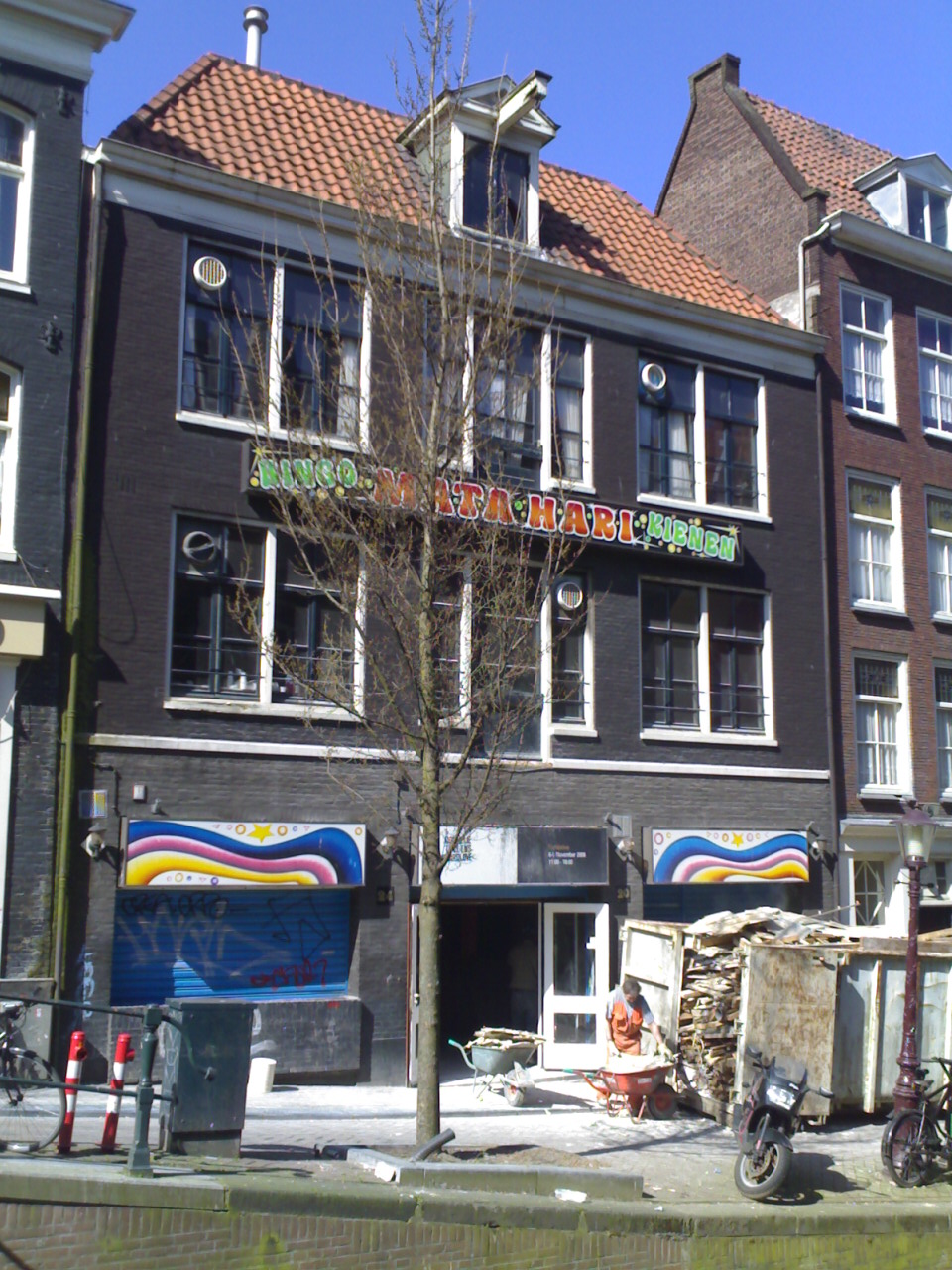 Renovatie rijksmonument Mata Hari, april 2009, Oudezijds Achterburgwal 22 Amsterdam